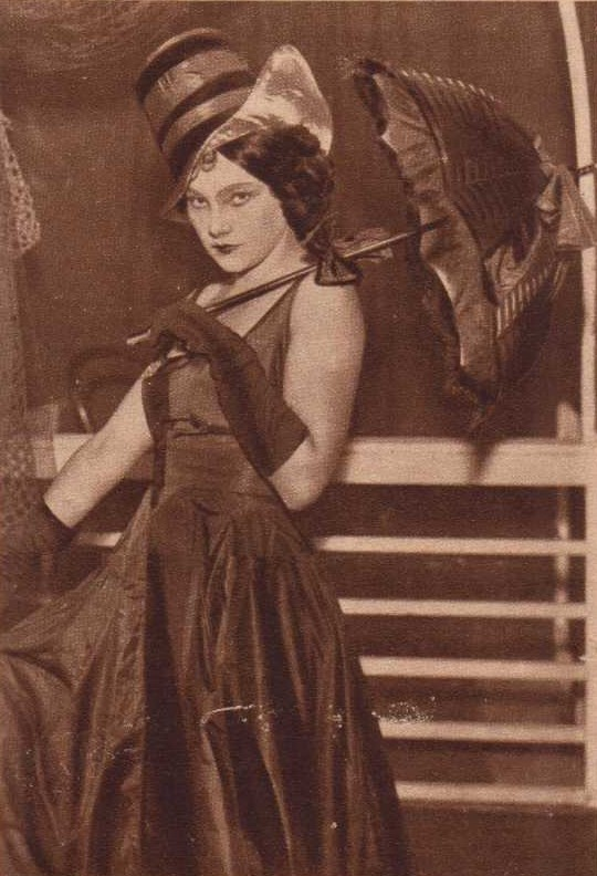 Jiřina Šejbalová, česká operní pěvkyně, herečka a divadelní pedagožka